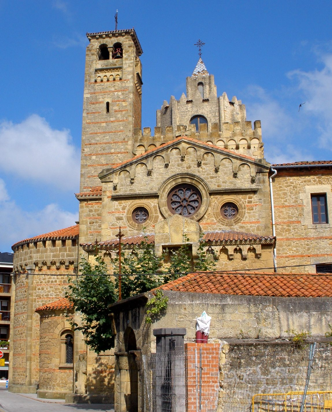 Iglesia de la Santísima Trinidad (PP Trinitarios), en Algorta, Gecho (Vizcaya)